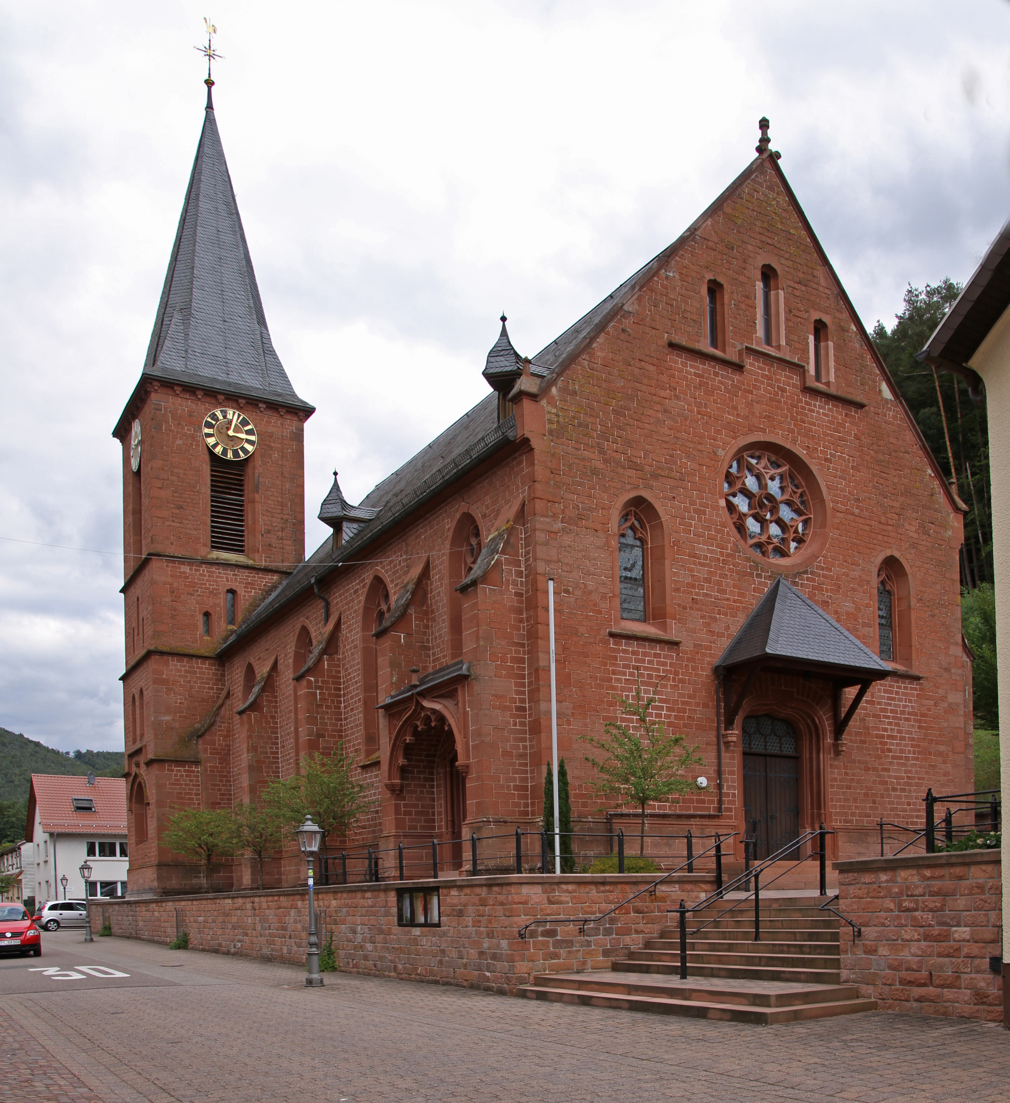 Erfweiler, Winterbergstraße 58; Katholische Kirche St. Wolfgang; neugotischer Saalbau, 1900, Architekt Wilhelm Schulte I., Neustadt an der Weinstraße.